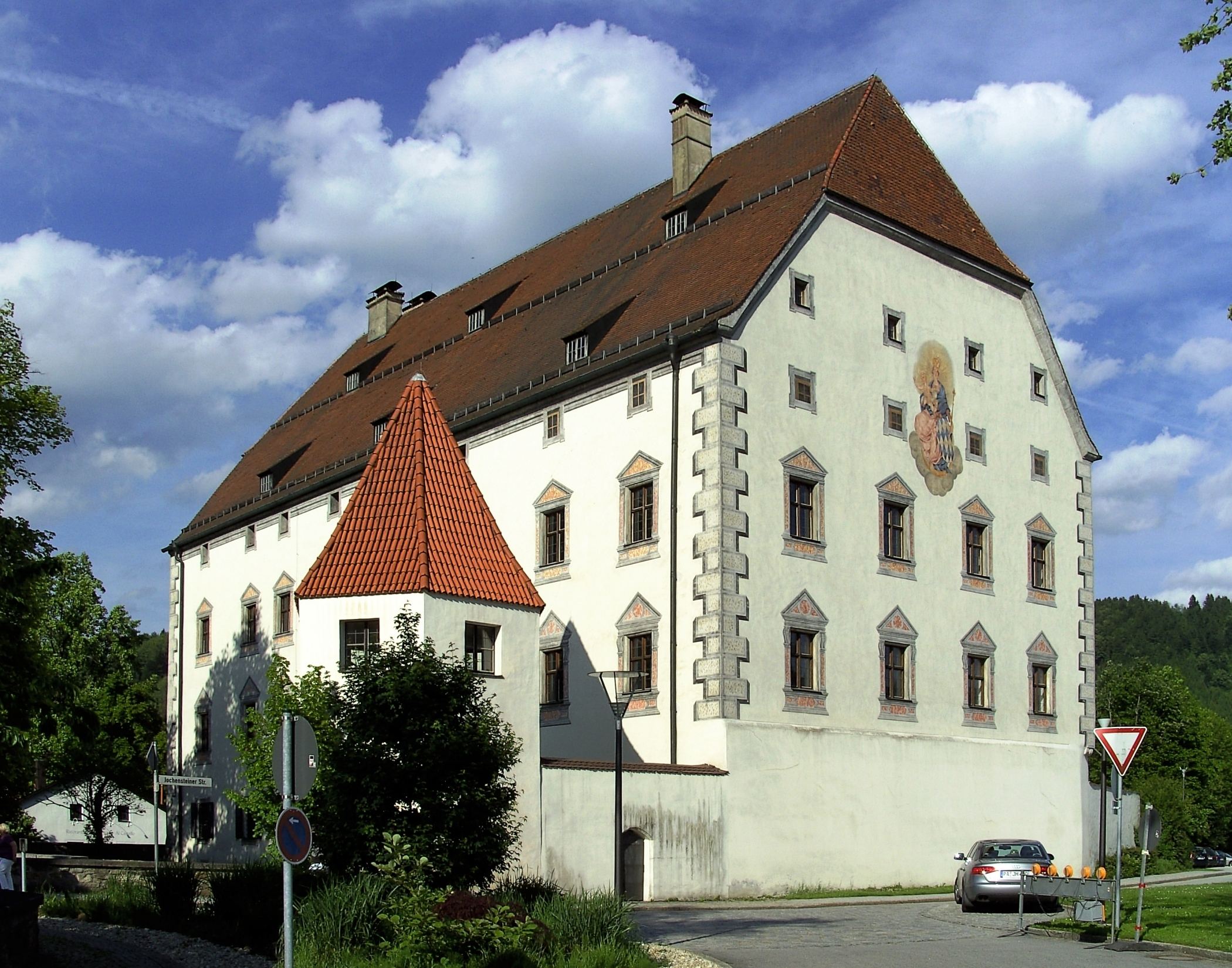 Das Schloss Obernzell ist ein ehemals fürstbischöfliches Wasserschloss in Obernzell.